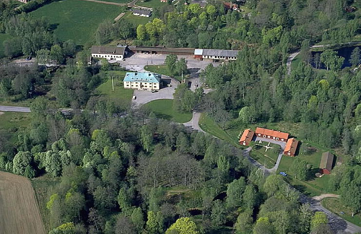 Gamla bruket. Motiv: Skyllbergs bruk Nyckelord: Flygbilder, Riksintressen Kategori: BruksmiljöGamla bruket.